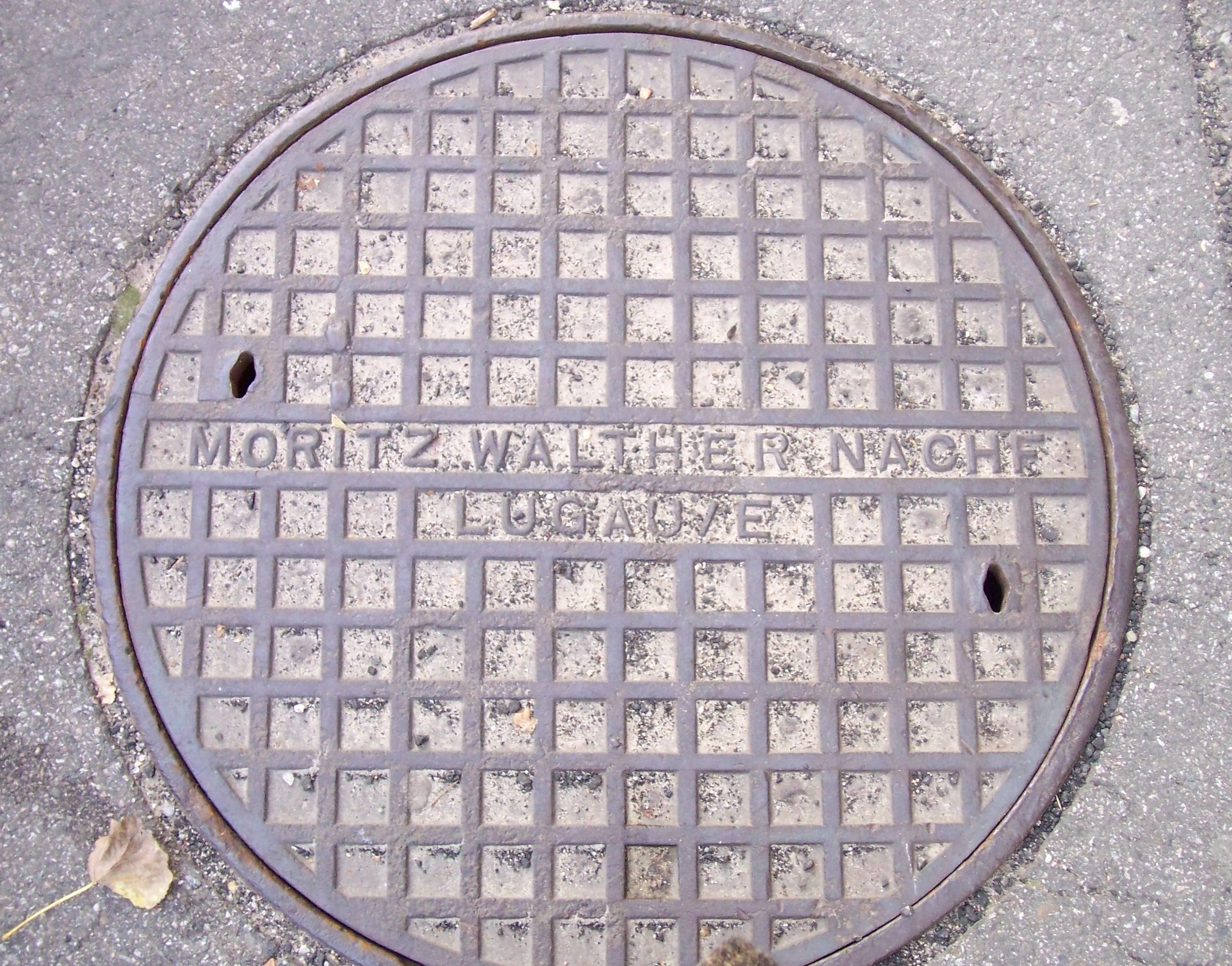 Kanaldeckel der aus der Produktion der Eisengiesserei in Lugau